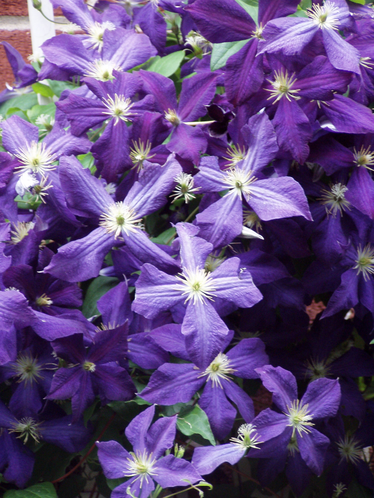 Clematis 'Jackmannii'